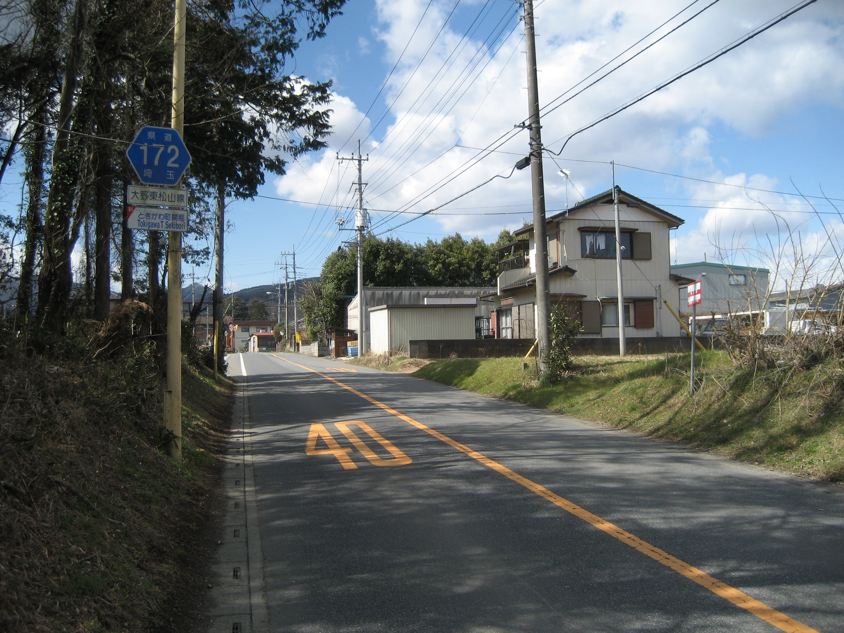 埼玉県道１７２号線ときがわ町内